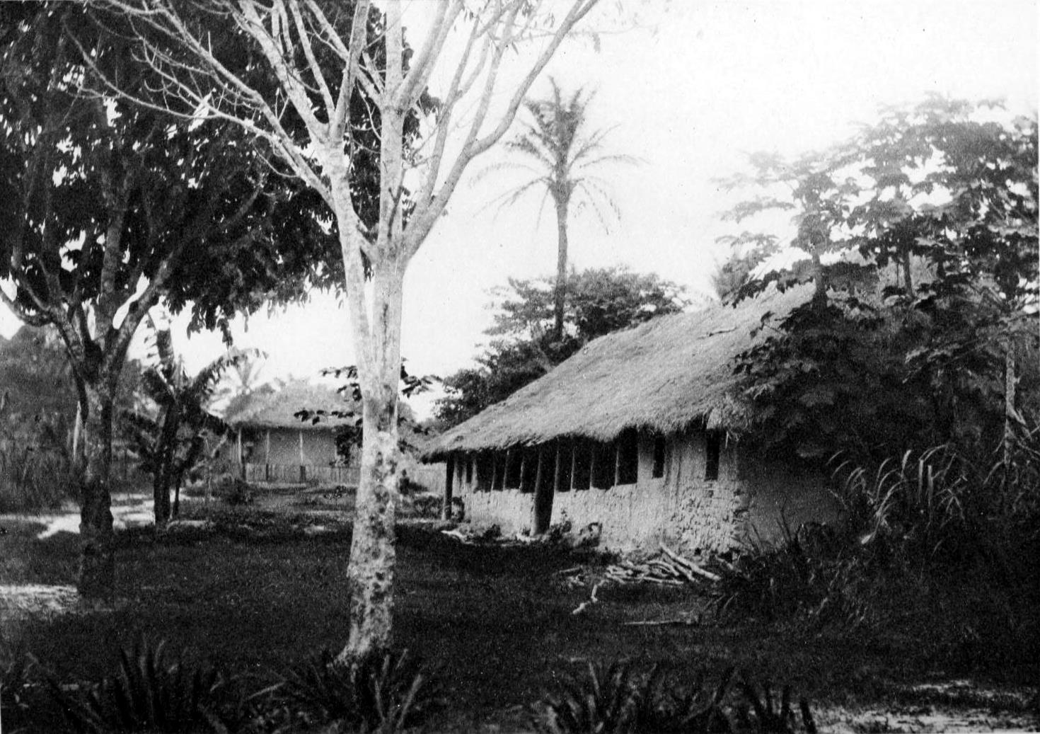 Equateur. - Ancienne station de l’Etat (1889) - p. 289